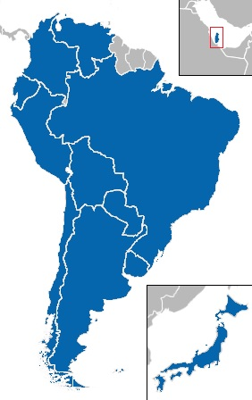 Страны, чьи сборные квалифицировались в финальную часть Кубка Америки по футболу 2019